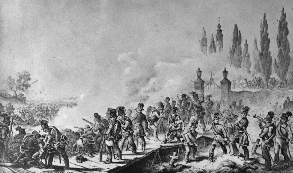 Darstellung des Gefechts bei ST. LUCIA in: STRACK J., Das Kopal-Denkmal in Znaim und das k.k. 10. Feld-Jäger-Bataillon von der Errichtung bis zur fünfzigjährigen Jubelfeier, WIEN 1864